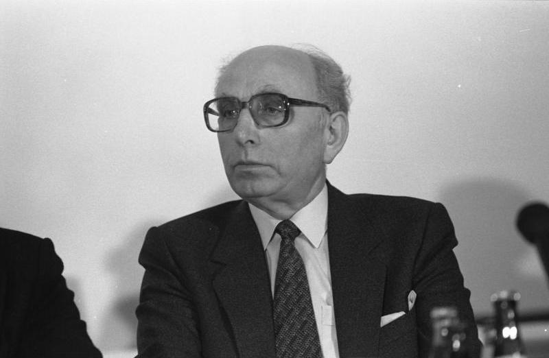 03.02.1983 Friedenskongreß der CDU im Konrad-Adenauer-Haus, Bonn.